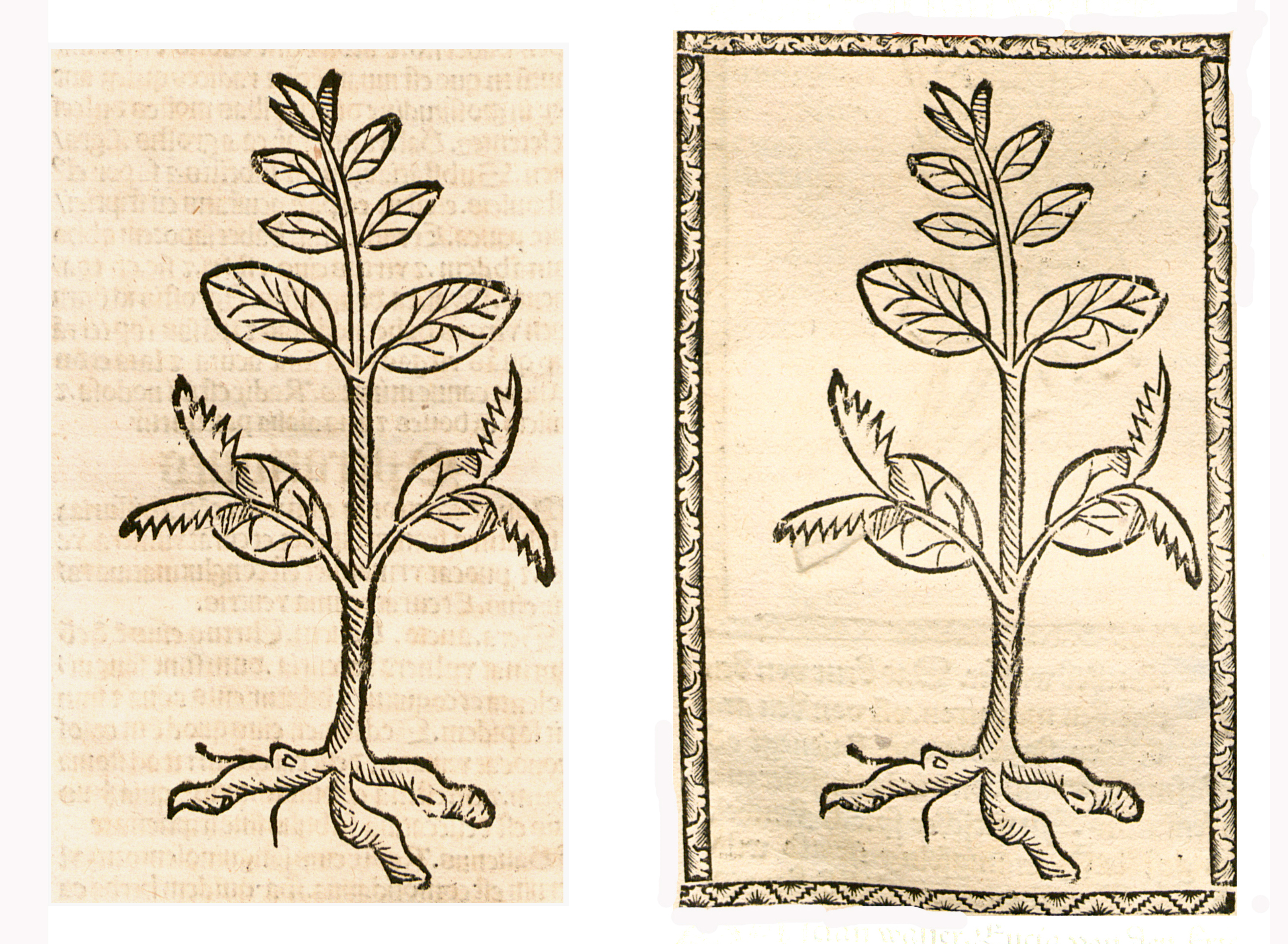 Abbildung von: Enzian